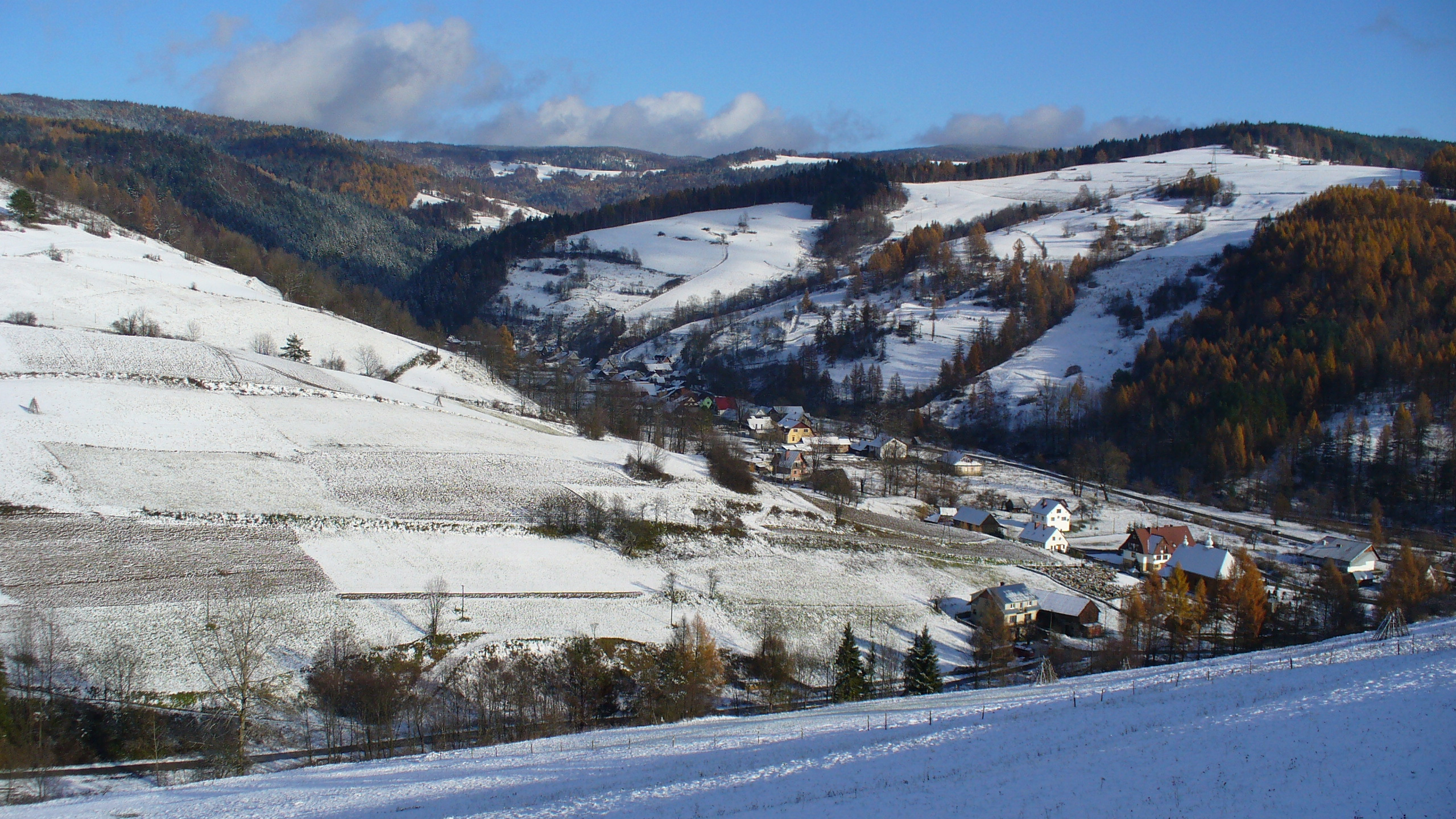 Wierchomla Wielka - widok ze szlaku gminnego do Łomnicy.